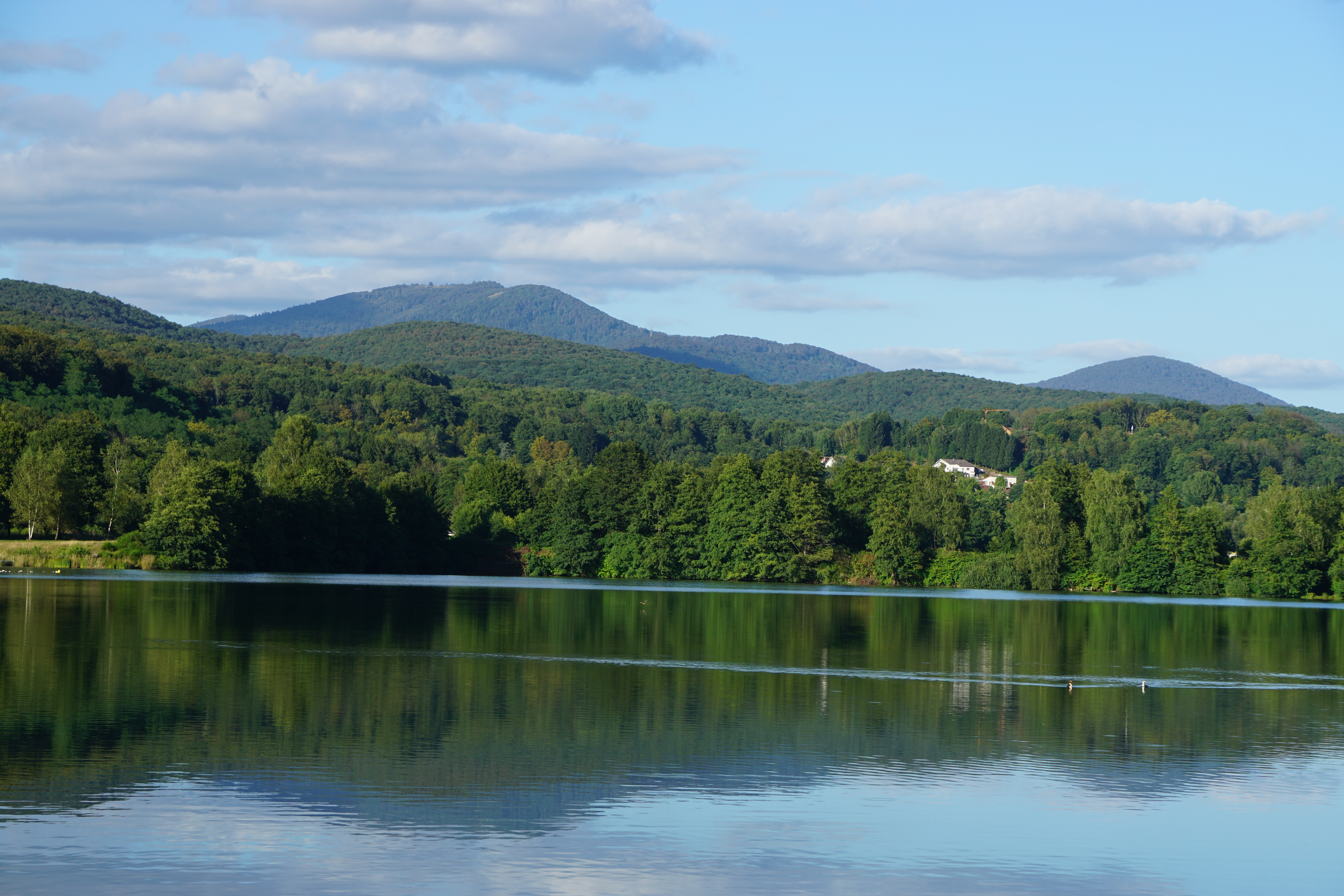 Les ballastières de Champagney et les Vosges en arrière plan.